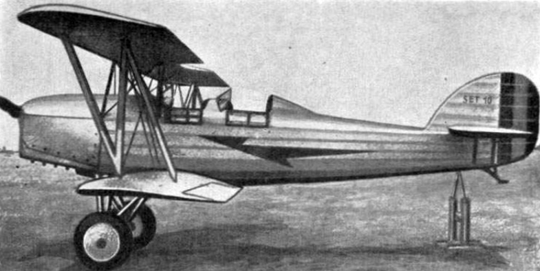 SET 10, cvičný letoun